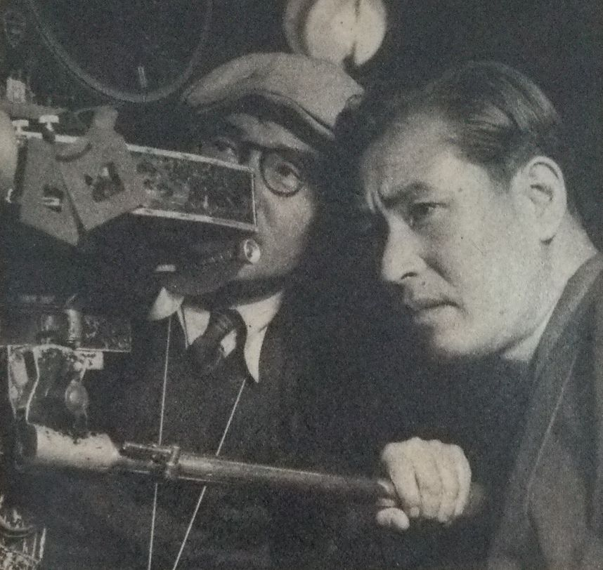 『風雪二十年』撮影時の佐分利信監督（右）。左はカメラマンの藤井静